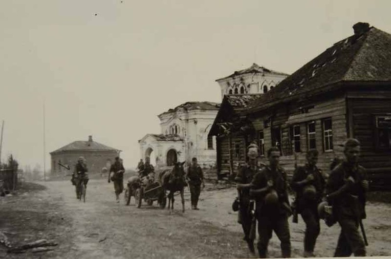 Беларуская (тарашкевіца): Мілаславічы (Miłasłavičy). Царква